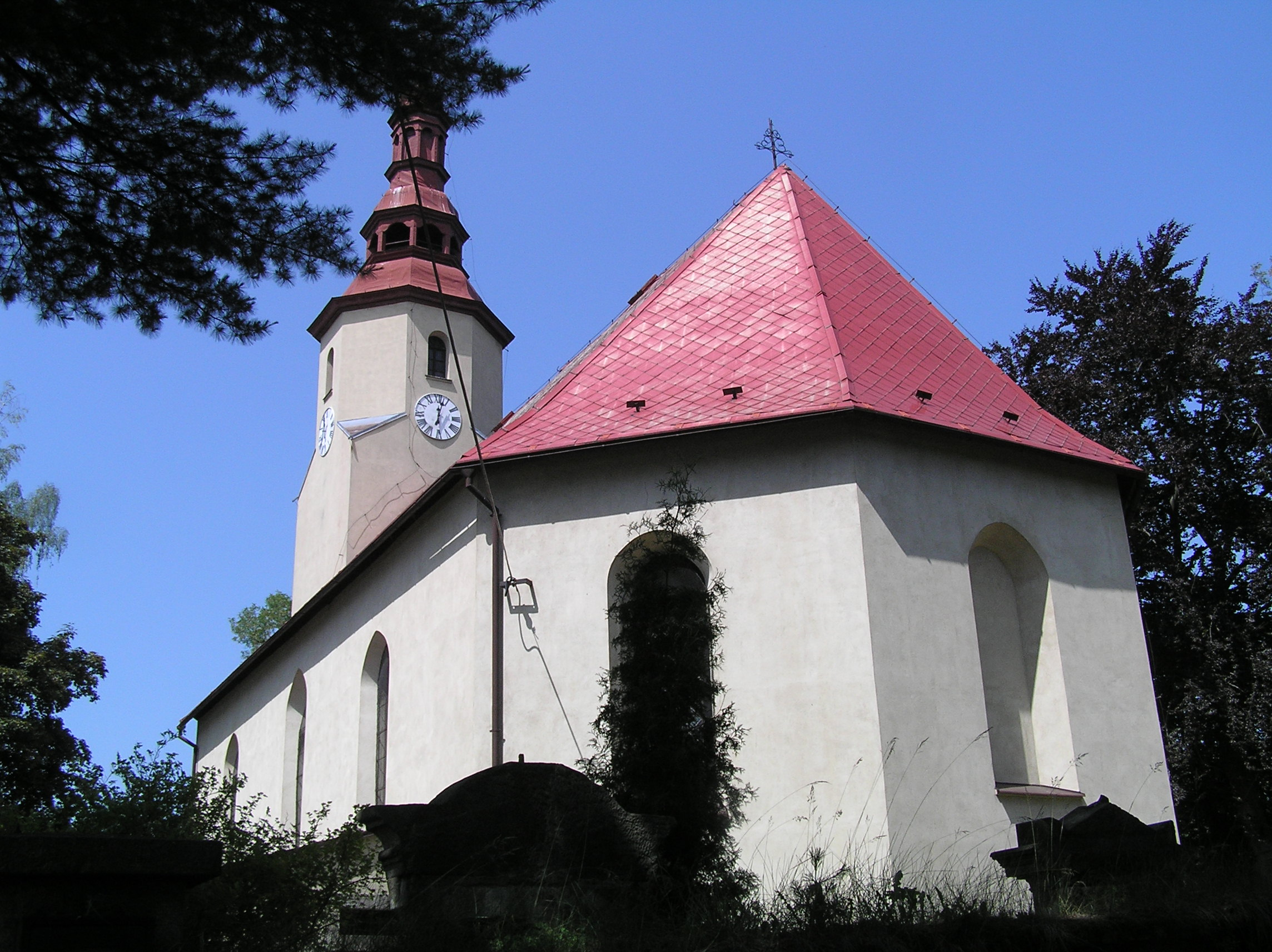 Kostel Nanebevzetí Panny Marie, Nová Ves (okres Liberec).